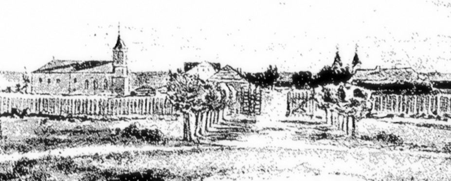 Беларуская (тарашкевіца): Маладэчна (Maładečna), вуліца Замкавая (vulica Zamkavaja)